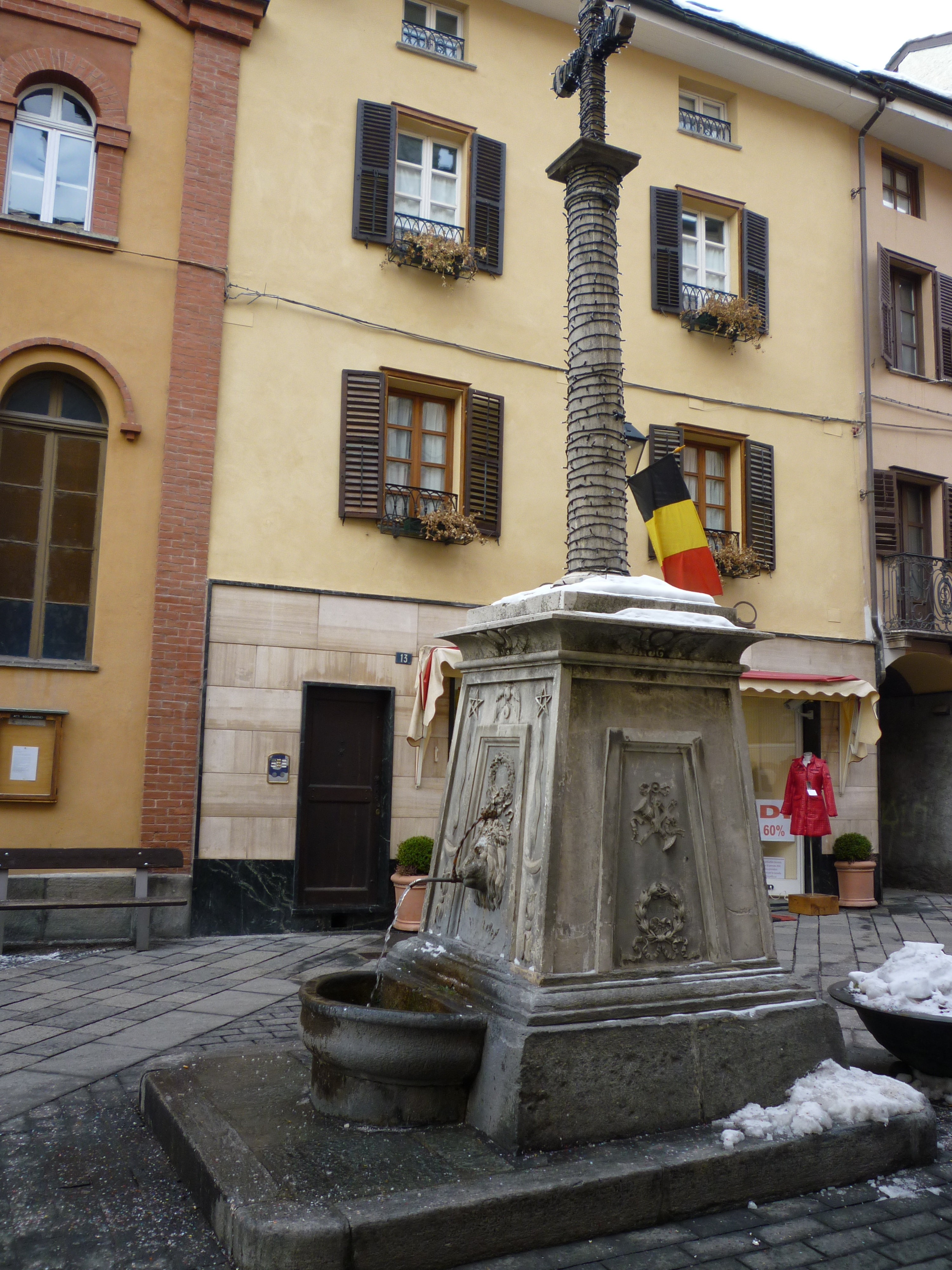 La Croix de Calvin à Aoste (Italie)